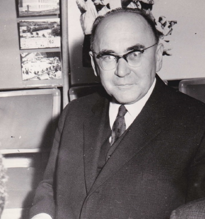 František Hyhlík, Praha, 1963